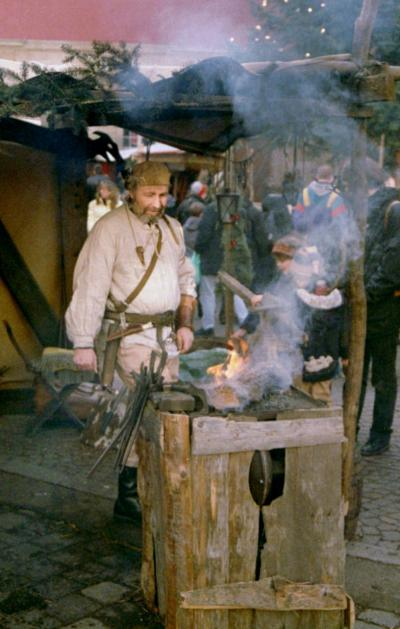 Esslingen - Weihnachtsmarkt - Schmied